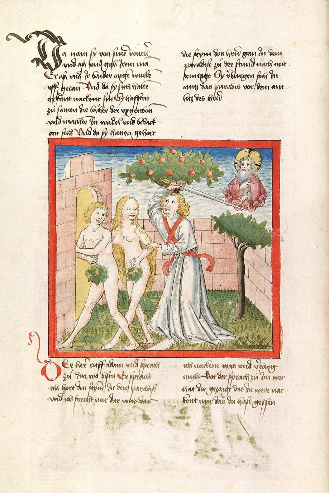 Codex Palatinus germanicus 16, Blatt 12v - Bibel, Altes Testament, Genesis: Der Erzengel Michael vertreibt die ersten Menschen aus dem Paradies. (Cpg 16 = Bibel AT, deutsch, Bücher Mose, Josua, Richter, Ruth)